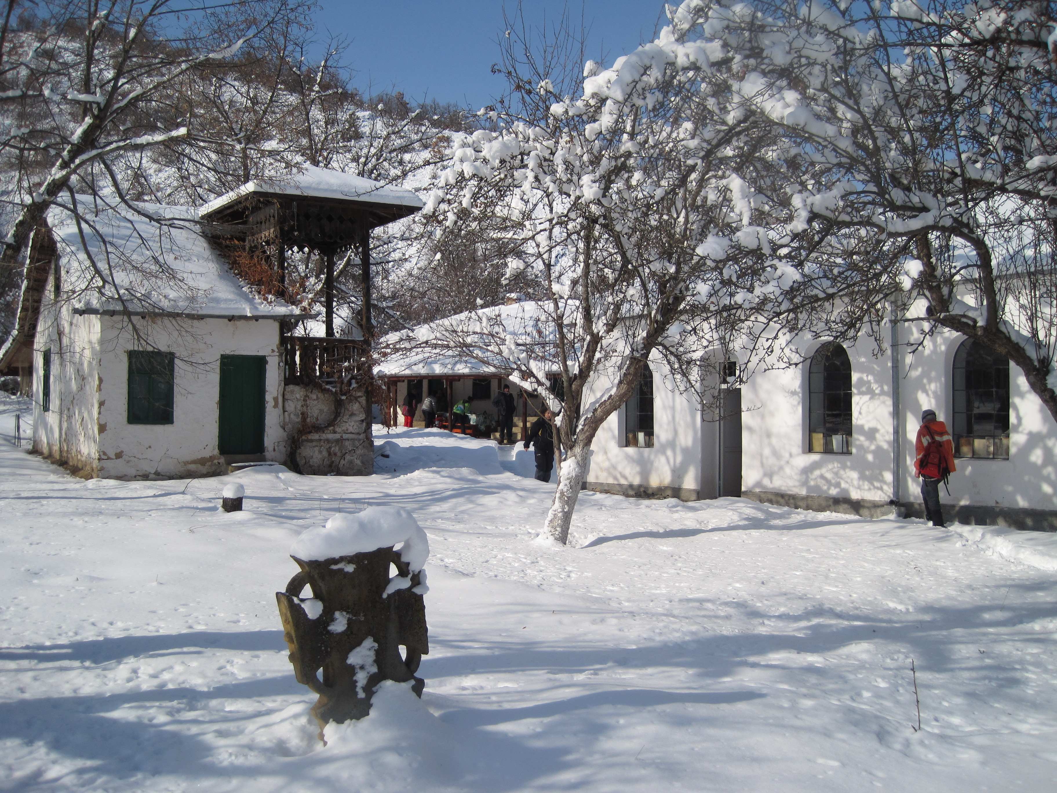 Чепърленски манастир двора